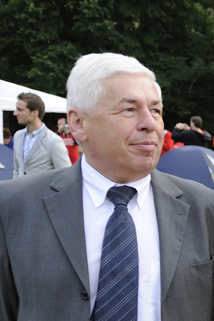 Eröffnung des IUSY Worldfestival im Europacamp in Weißenbach am Attersee. Weißenbach, 25.07.2011, Copyright Thomas Jantzen / SPÖ